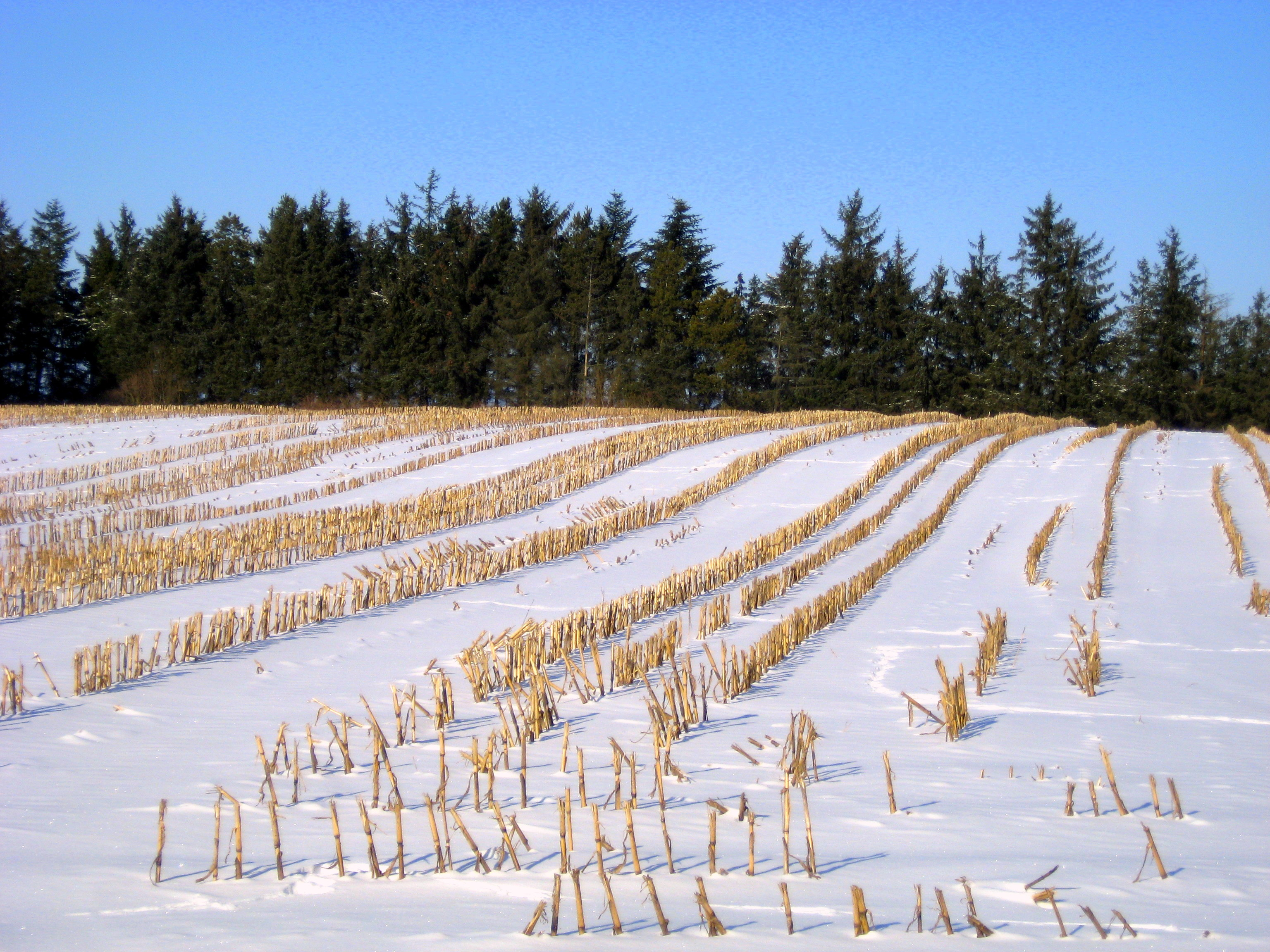 Vinter i Danmark